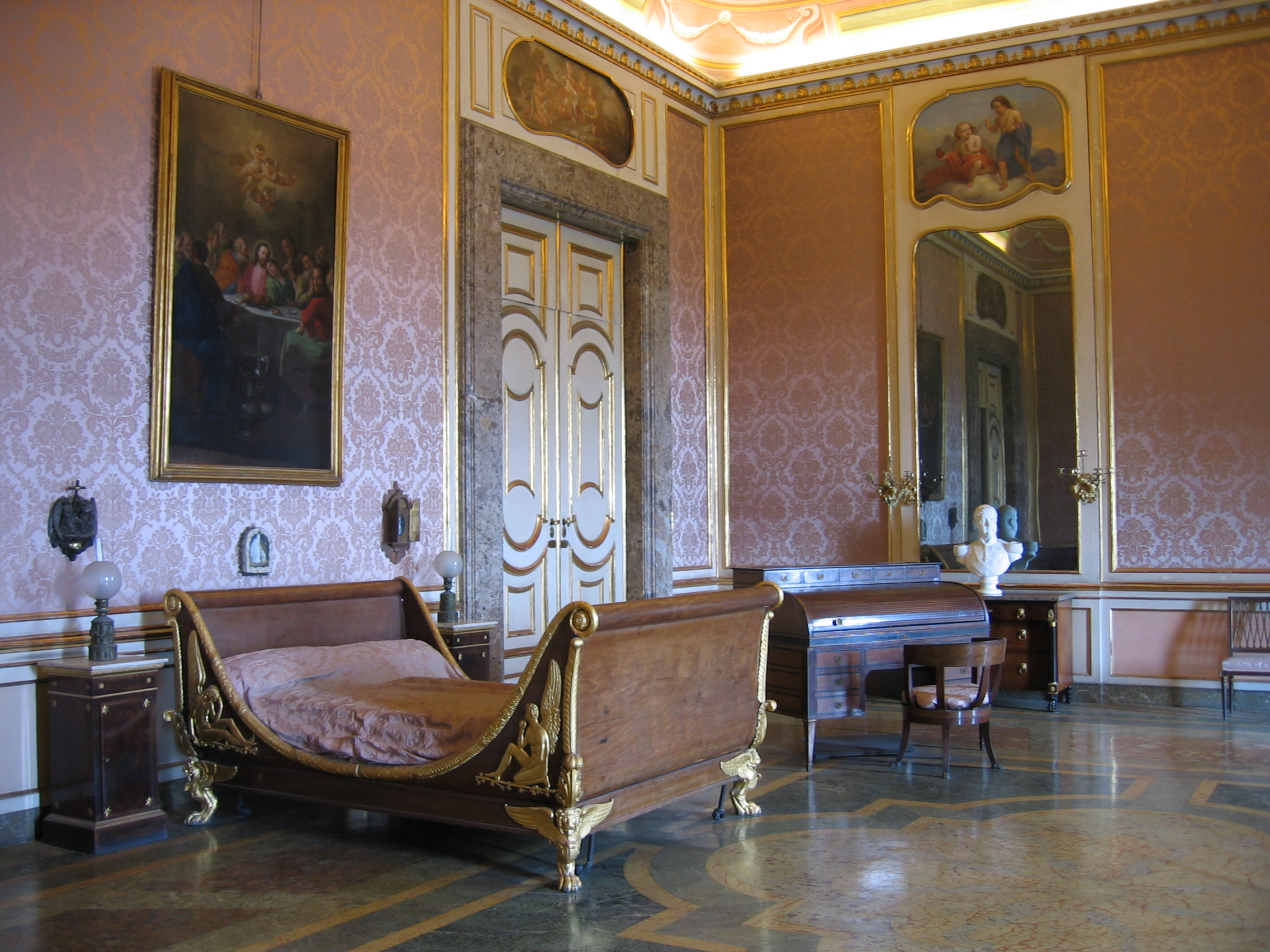 Schlafzimmer Ferdinands II. im Königspalast von Caserta